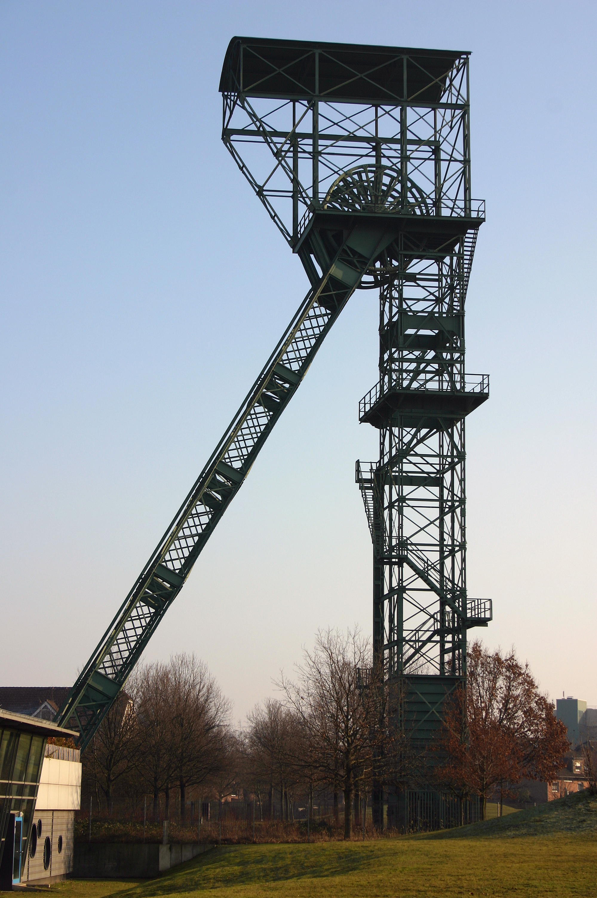 Fördergerüst der ehemaligen Zeche Friedrich-Thyssen 6 in Duisburg-Hamborn. Heute ist das Gerüst ein Industriedenkmal sowie ein Teilobjekt der Route der Industriekultur. (Ausschnitt vom Originalfoto; fotografiert von BlackIceNRW.) This is a photograph of an architectural monument., no. 0